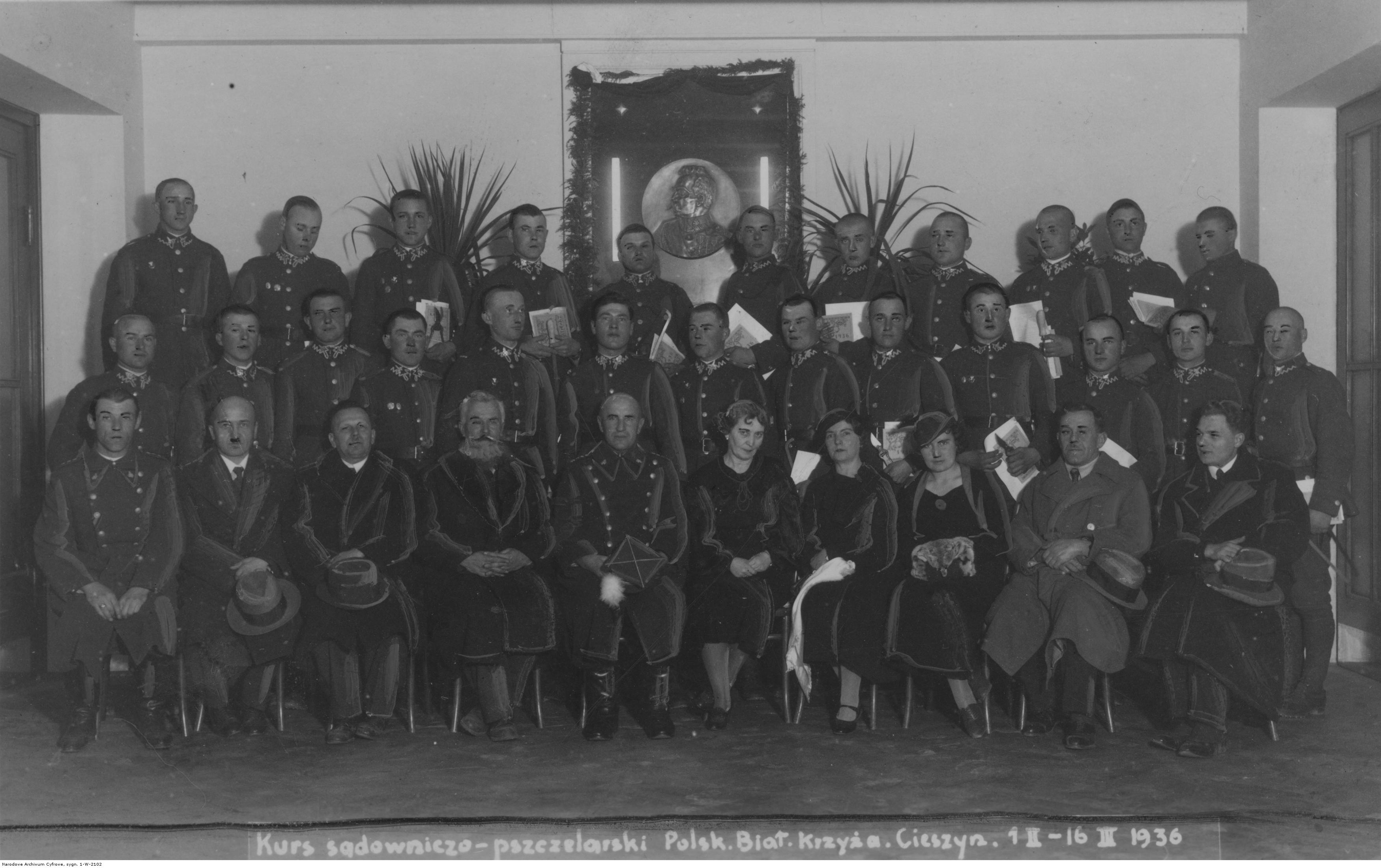 Fotografia grupowa uczestników kursu sadowniczo-pszczelarskiego w 4 Pułku Strzelców Podhalańskich w Cieszynie oraz członkiń Zarządu Polskiego Białego Krzyża i prelegentów; 16 marzec 1936 r. Koncern Ilustrowany Kurier Codzienny - Archiwum Ilustracji. Sygnatura: 1-W-2102